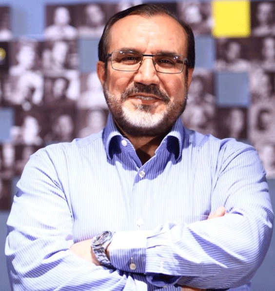 علی حدادی، نماینده مجلس یازدهم